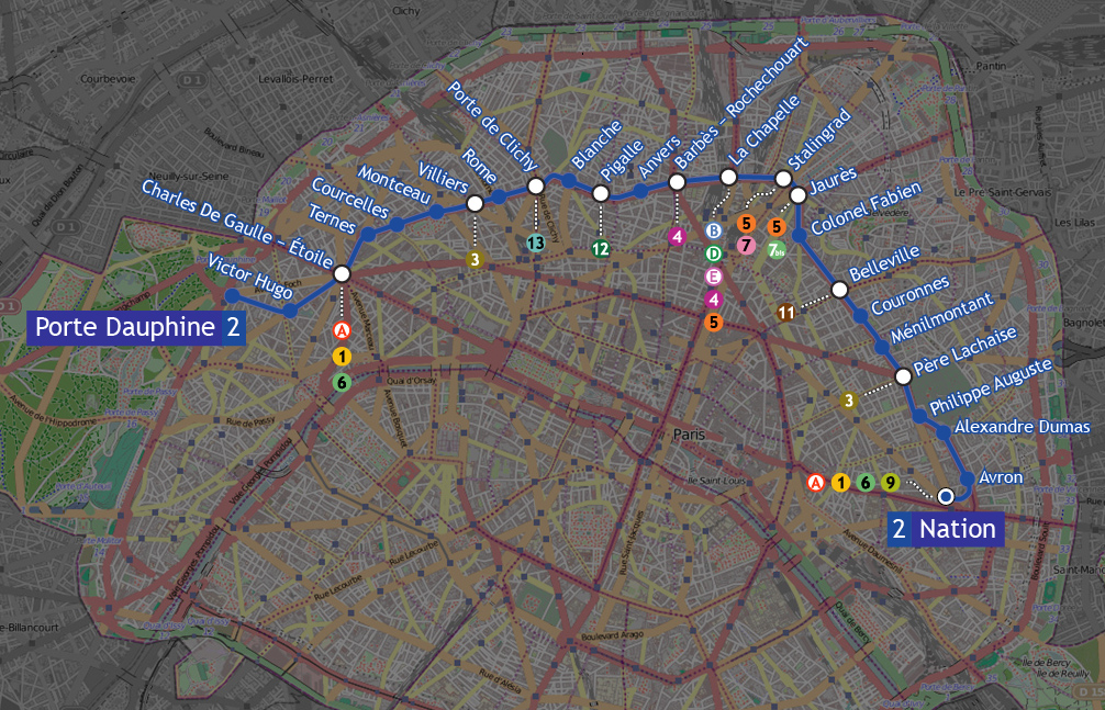 Français cadien: Tracé géographiquement exacte de la ligne 2